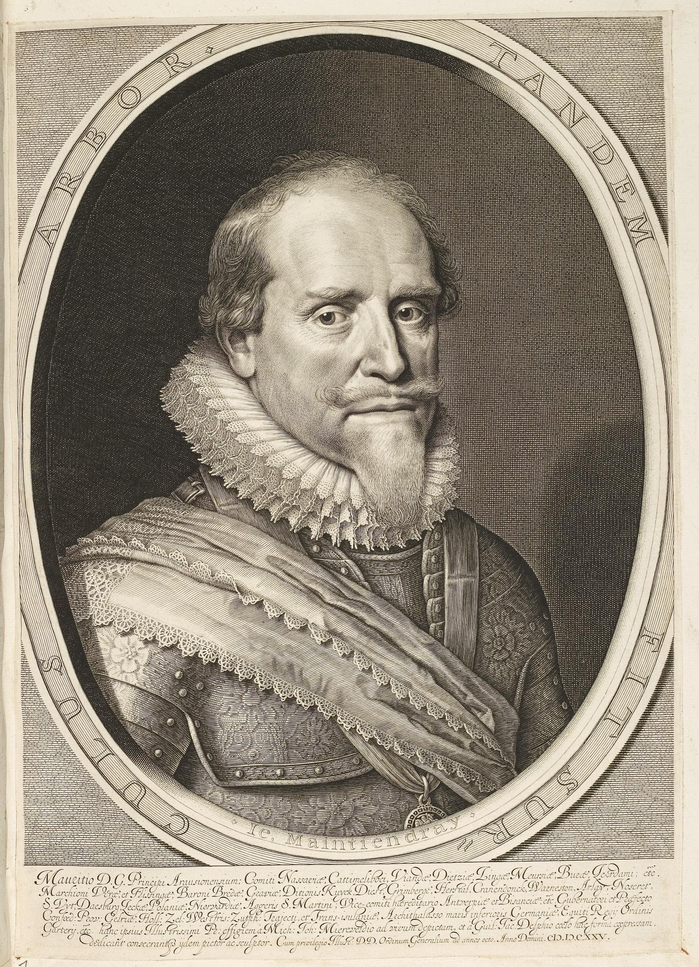 Grafik aus dem Klebeband Nr. 1 der Fürstlich Waldeckschen Hofbibliothek Arolsen Motiv: Moritz von Oranien